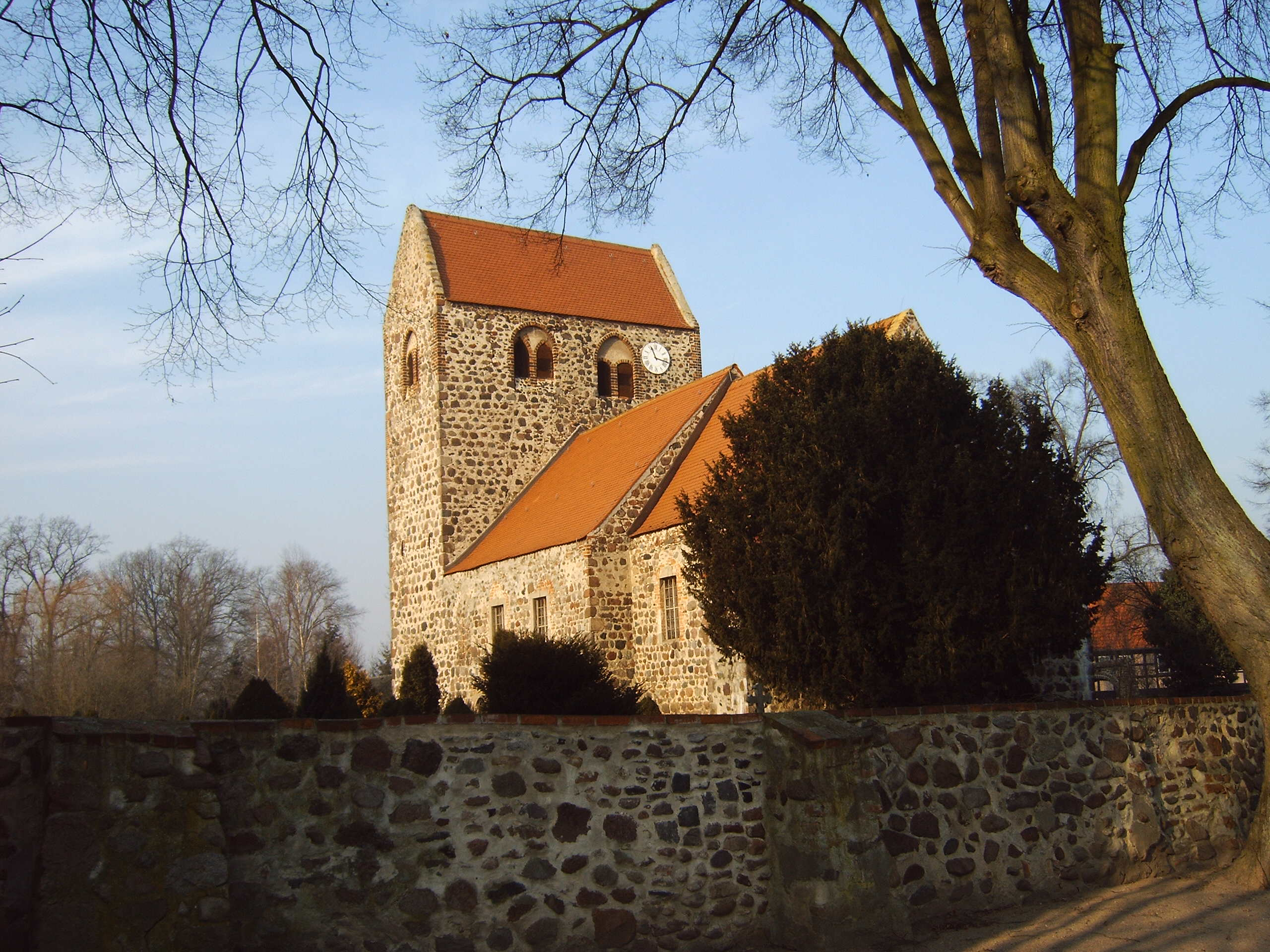 Dorfkirche von Dahlen, Bild aufgenommen am 26.1.2006 von Olaf Meister